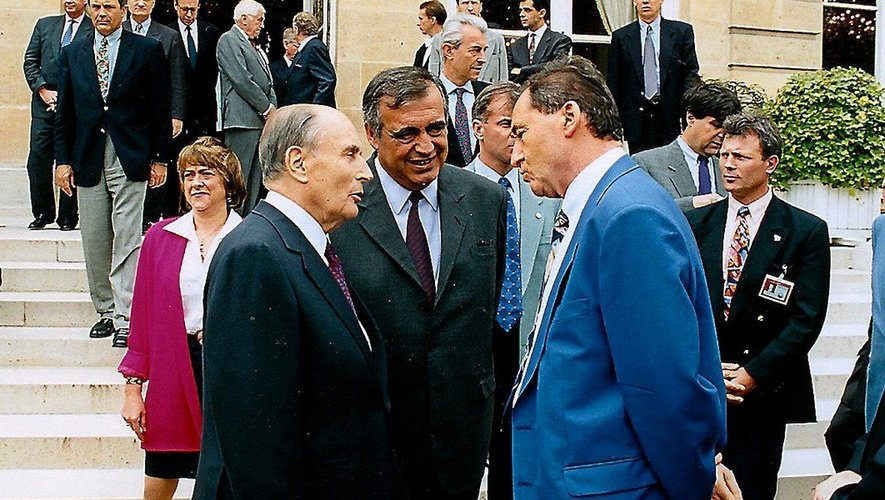 François Mitterrand et Gilbert Baumet à l'Elysée